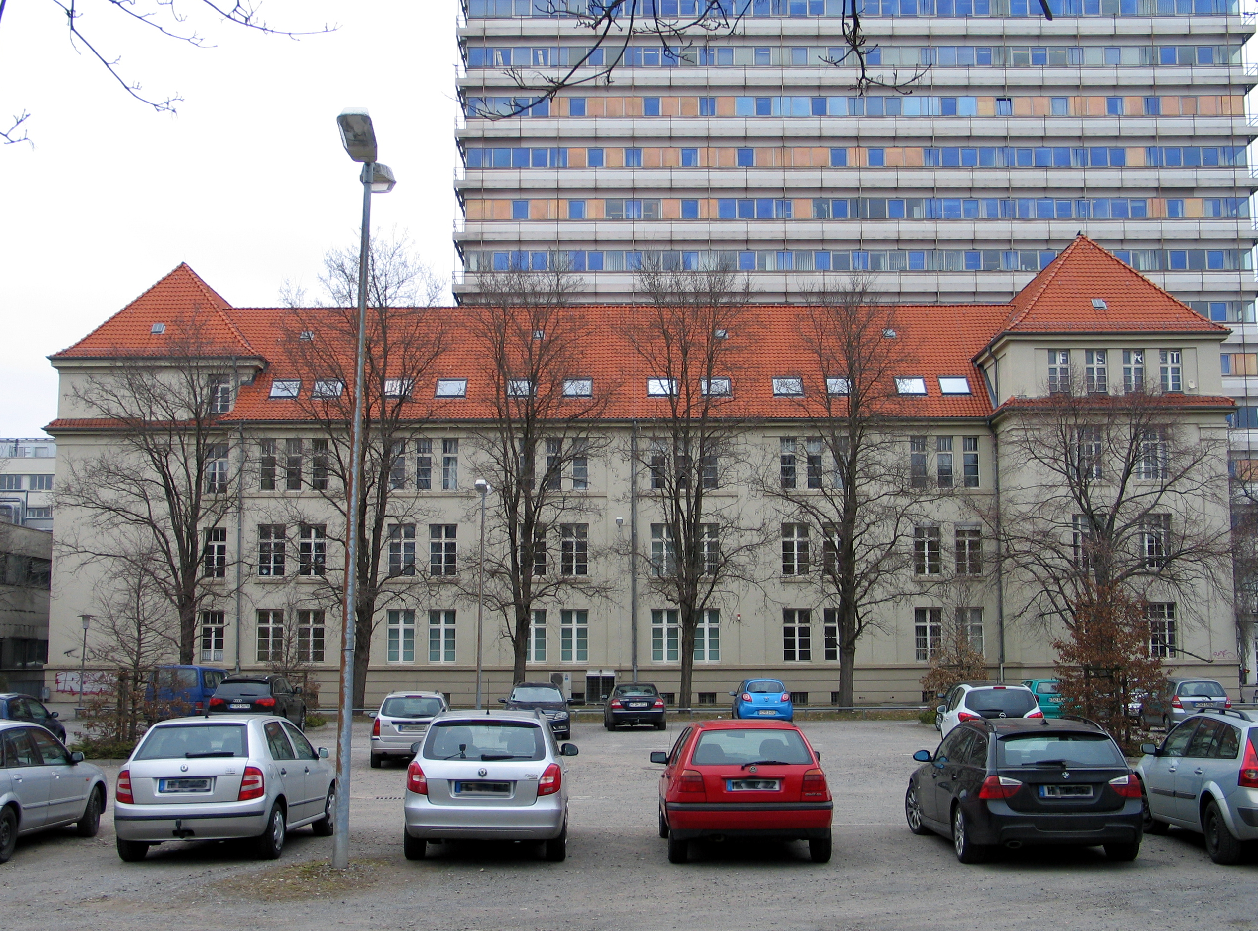 Dem Gelände des 1. Hannoverschen Ulanenregiments Nr. 13 wurde 1936 diese Kaserne hinzugefügt. Das Gebäude vor dem Universitäts-Hochhaus dient der Gottfried Wilhelm Leibniz Universität Hannover heute als Gebäude 3407 unter der (heutigen) Adresse Callinstraße 34...